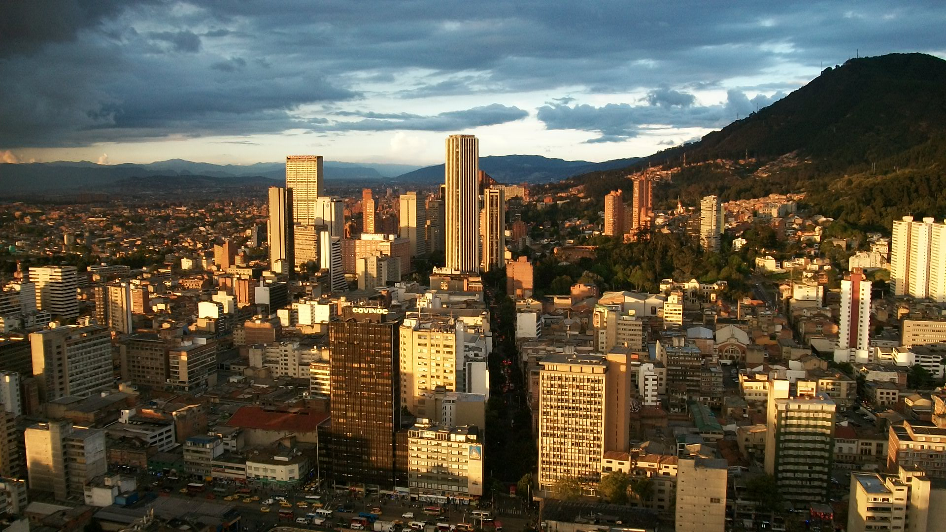 Una hermosa vista de Bogotá en la noche